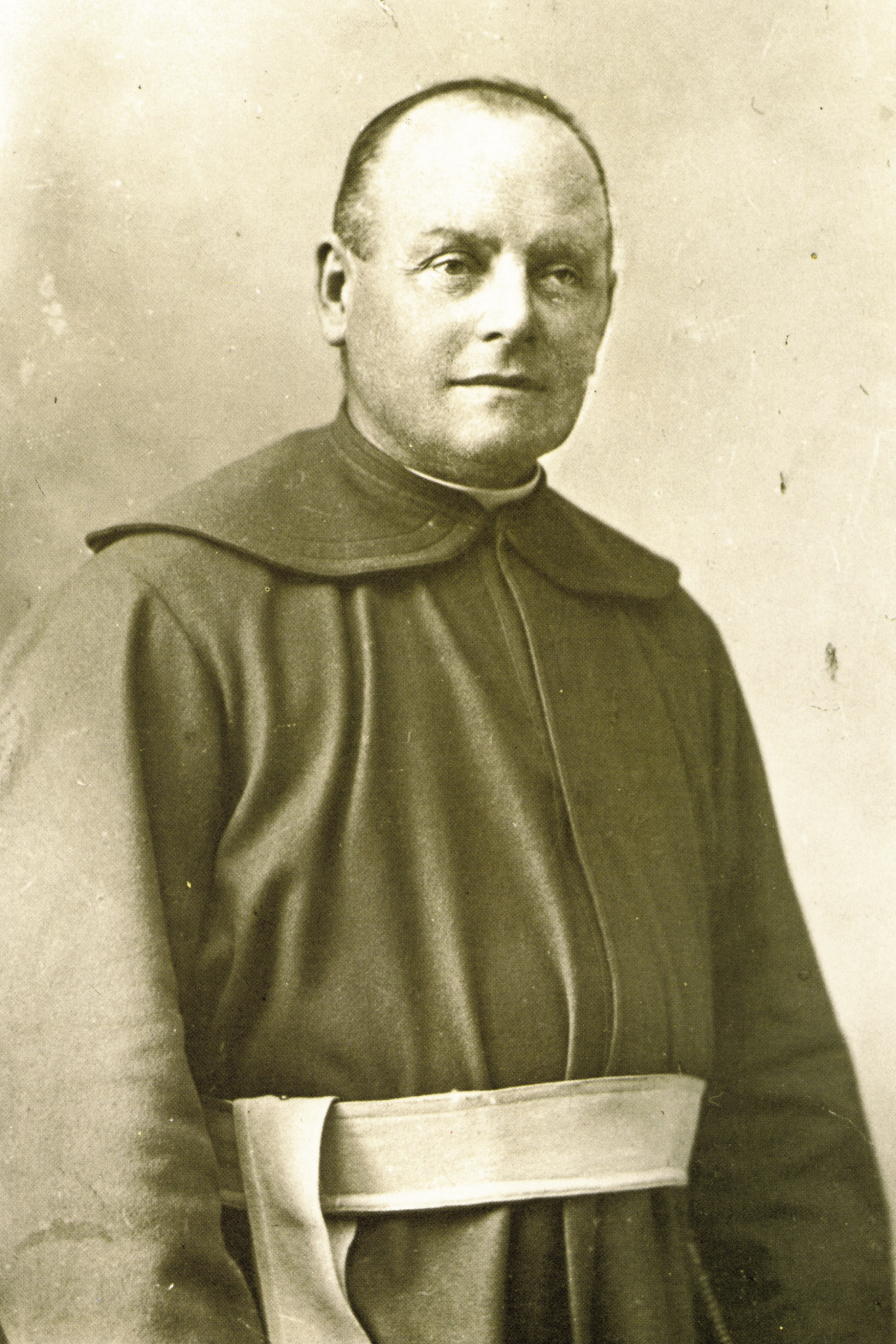 Padre Ludovico Sala